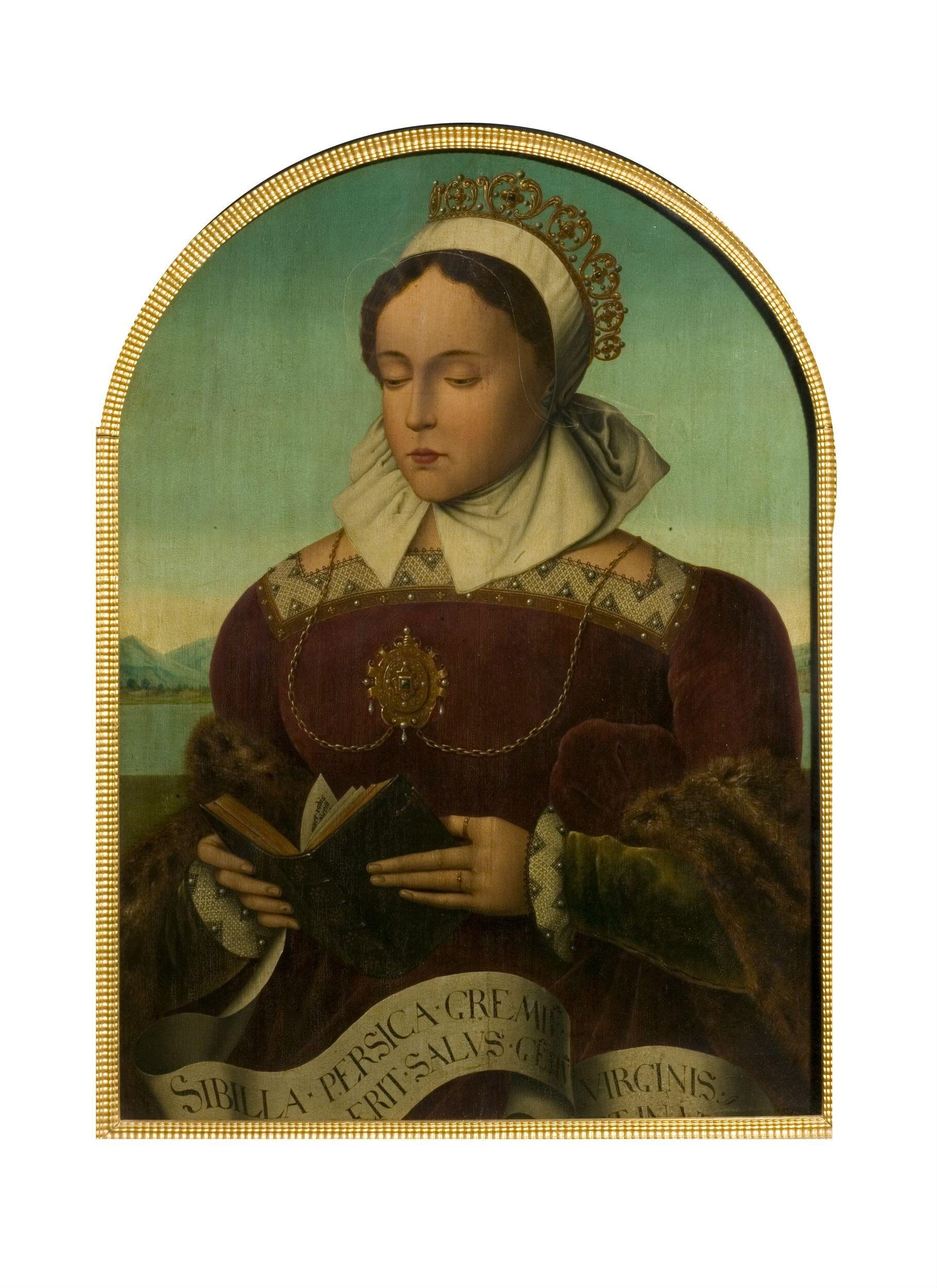 Sibilla Persica